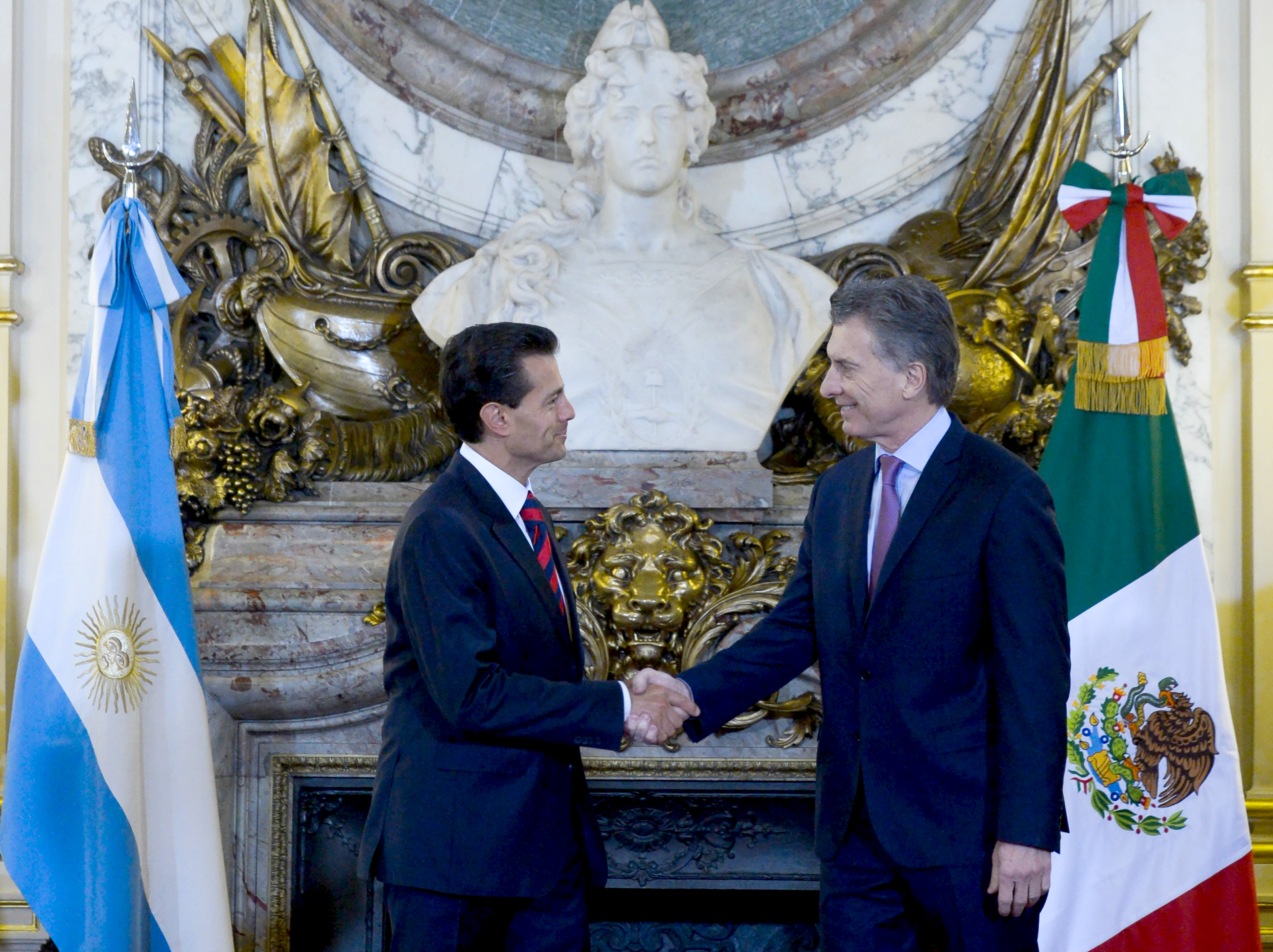 El Presidente de la Nación Argentina, Mauricio Macri recibió al Presidente de los Estados Unidos Mexicanos, Enrique Peña Nieto en la Casa Rosada para reforzar la relación bilateral entre ambos países y firmar acuerdos en diversas áreas.